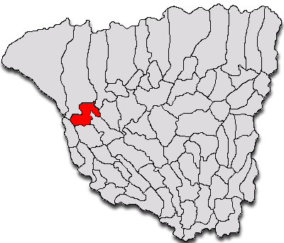 Categorie:Hărţi ale judeţului Gorj